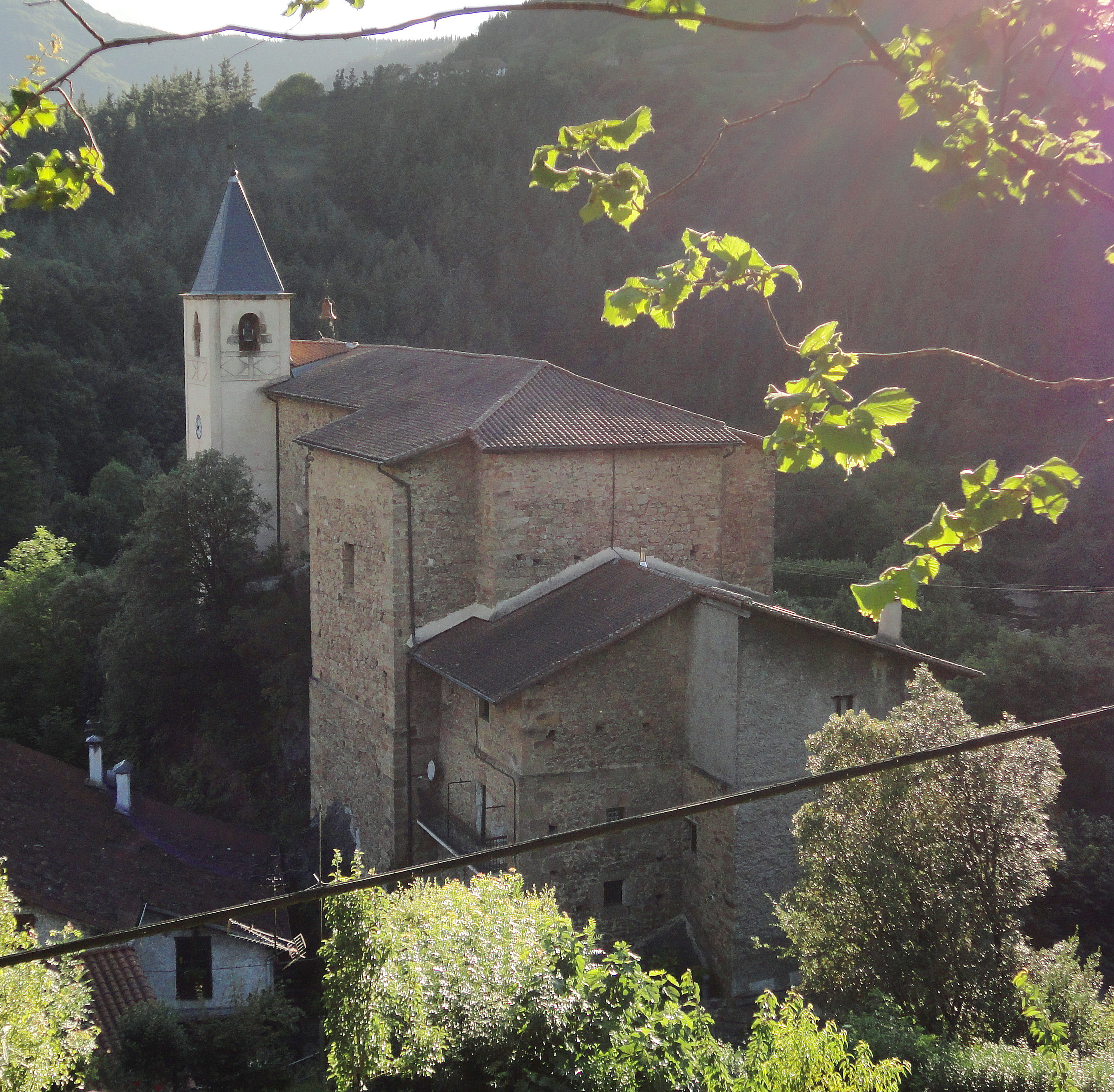 San Gregorio eliza - Ataun